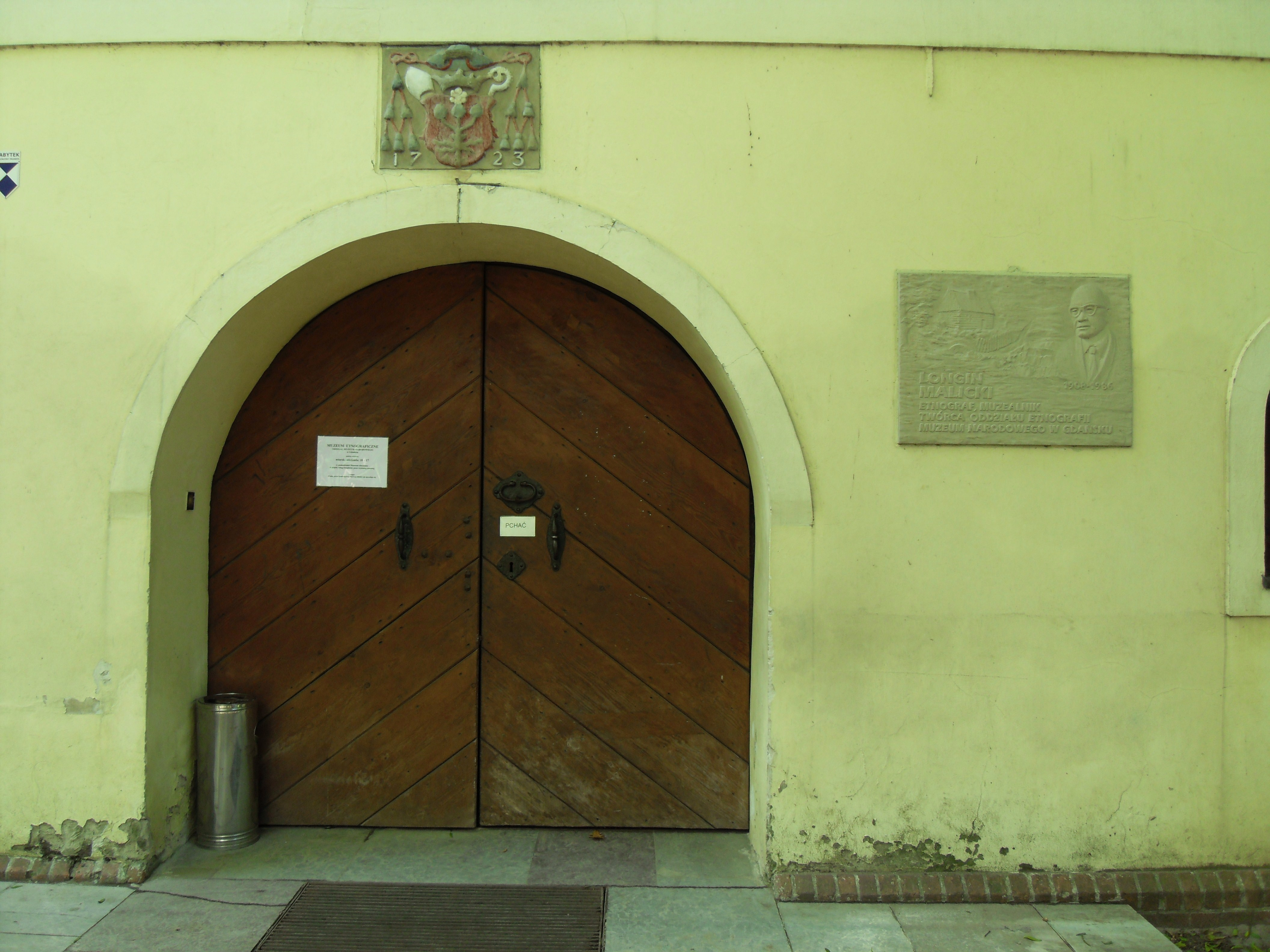 Spichlerz Opacki w Gdańsku Oliwie.